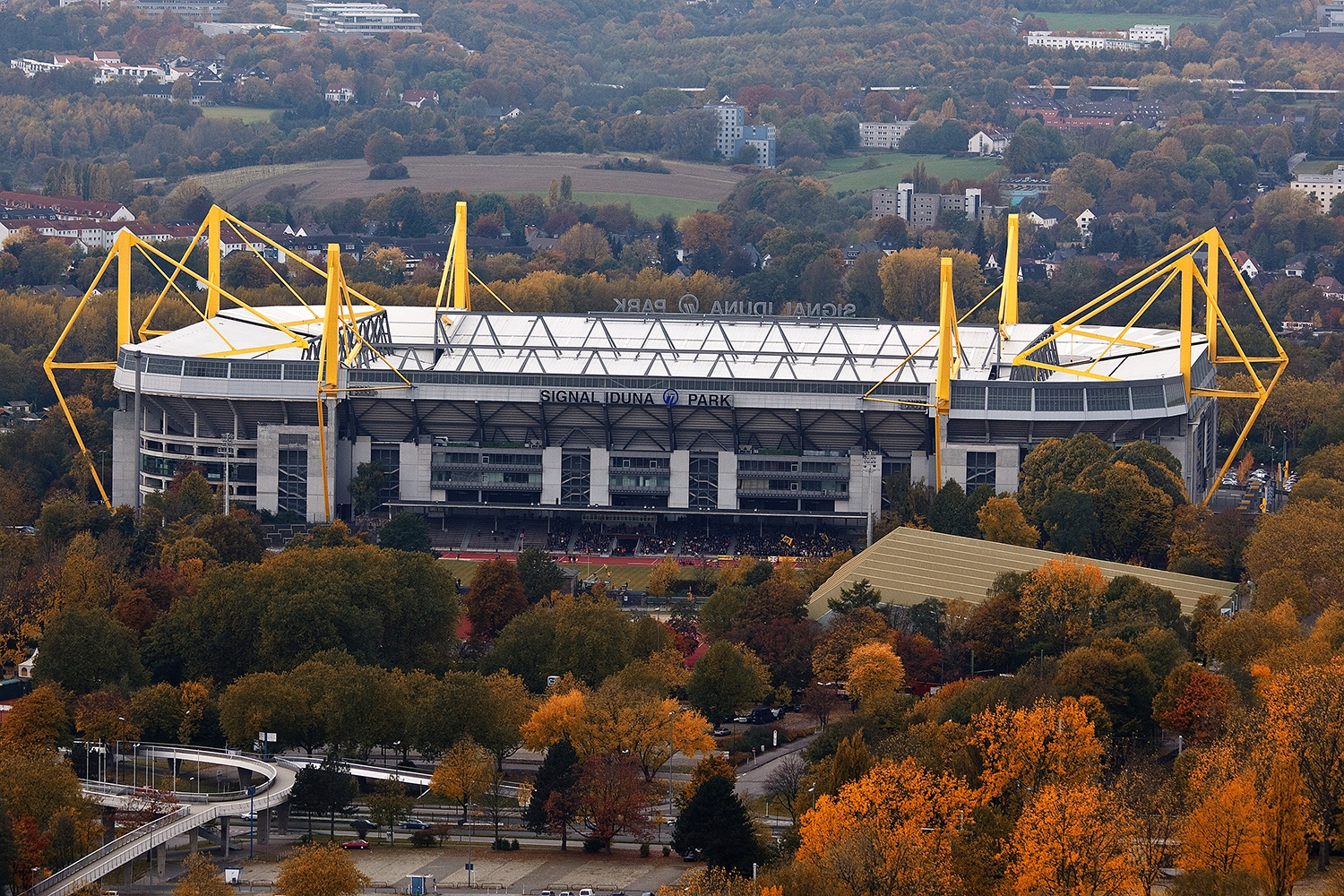 Spielstätte von Borussia Dortmund, Datum/Uhrzeit: 24.10.2009 14:33:25